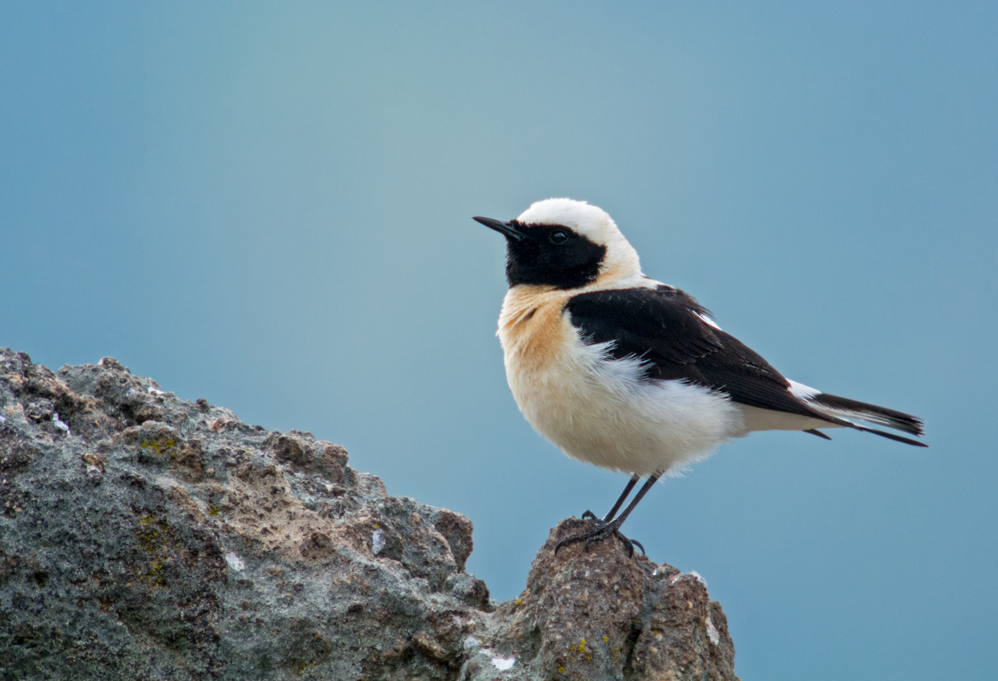 Digiscoping with Swarovski ATM 80 HD 30 X, Nikon 1V1 + 11-27,5 mm lens (Adapter DCB)